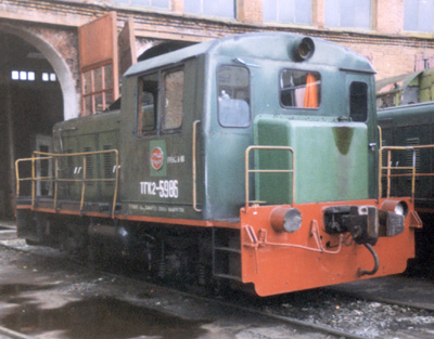 Тепловоз ТГК2-5986